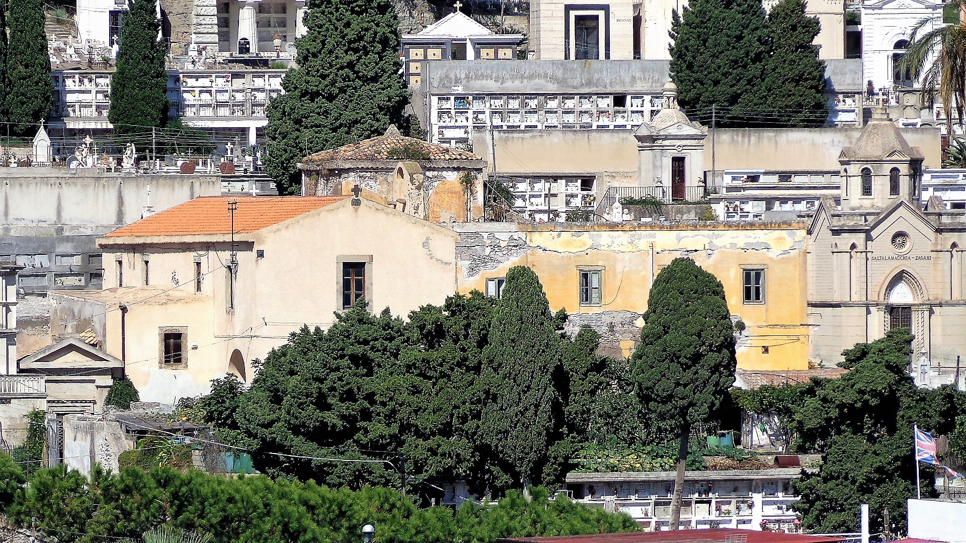 Chiesa dell'Assunta e cimitero di Lipari